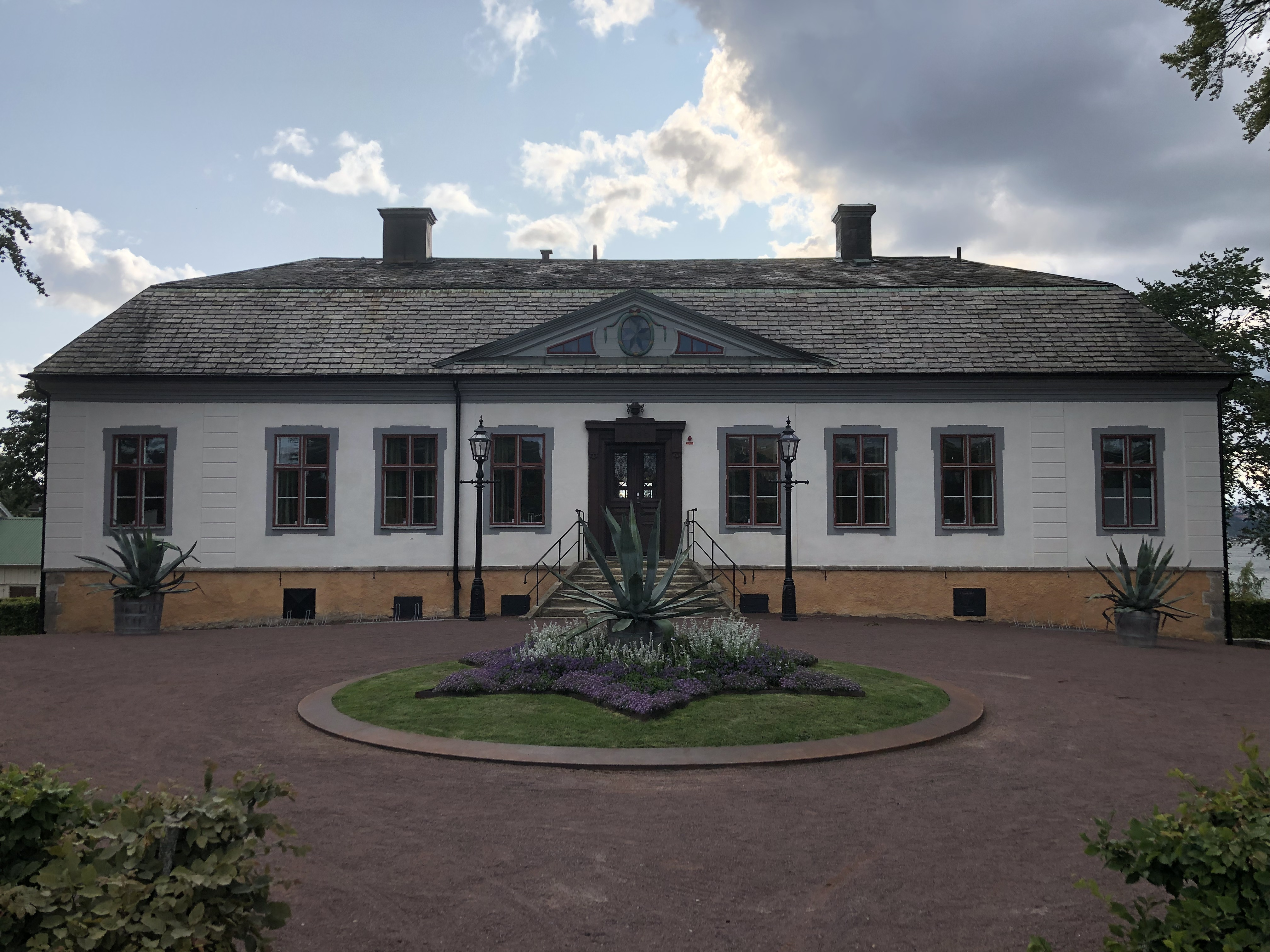 Rosenlunds herrgård huvudfasaden mot norr